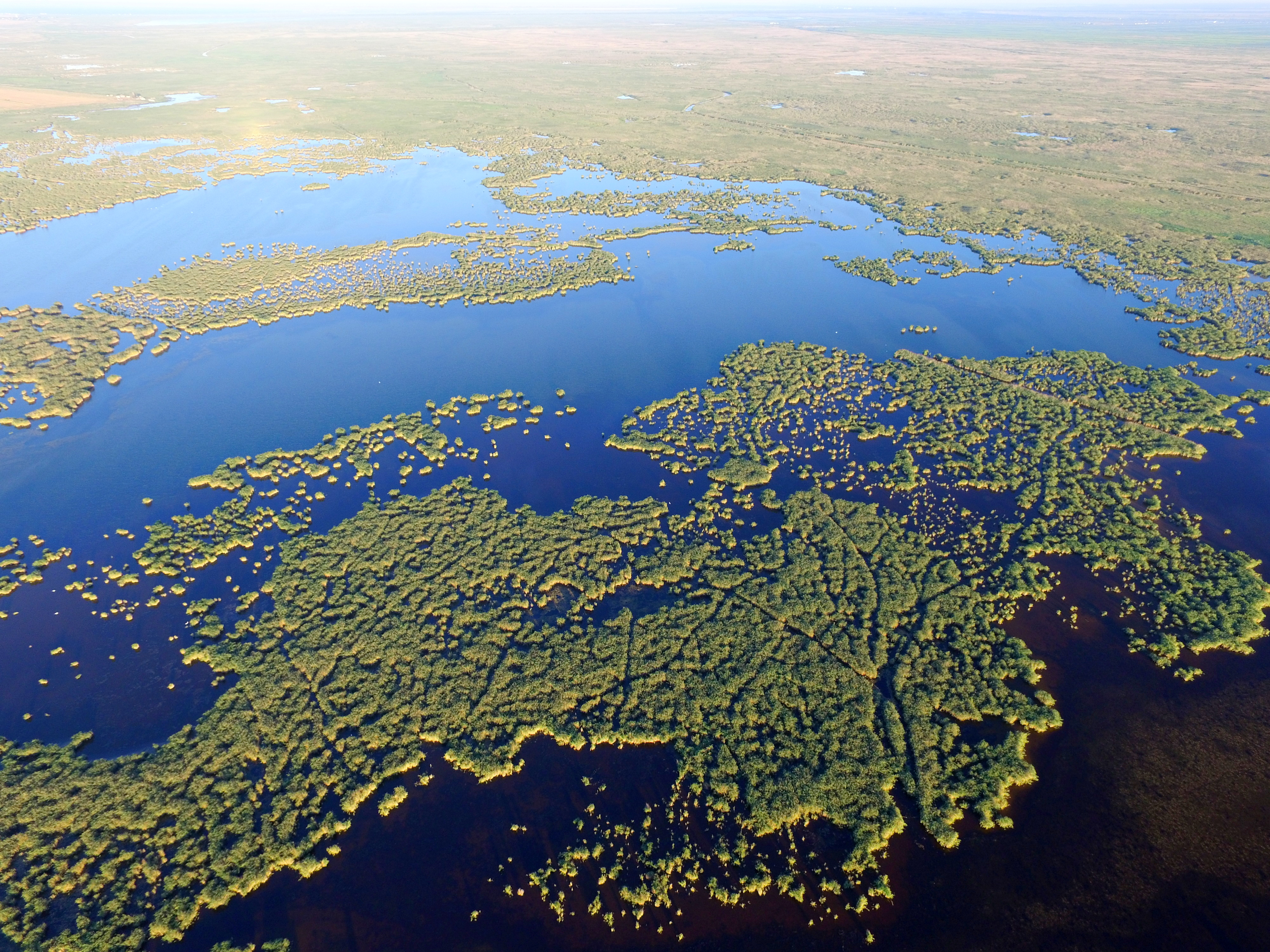 Имеет большое значение для водно-болотных птиц